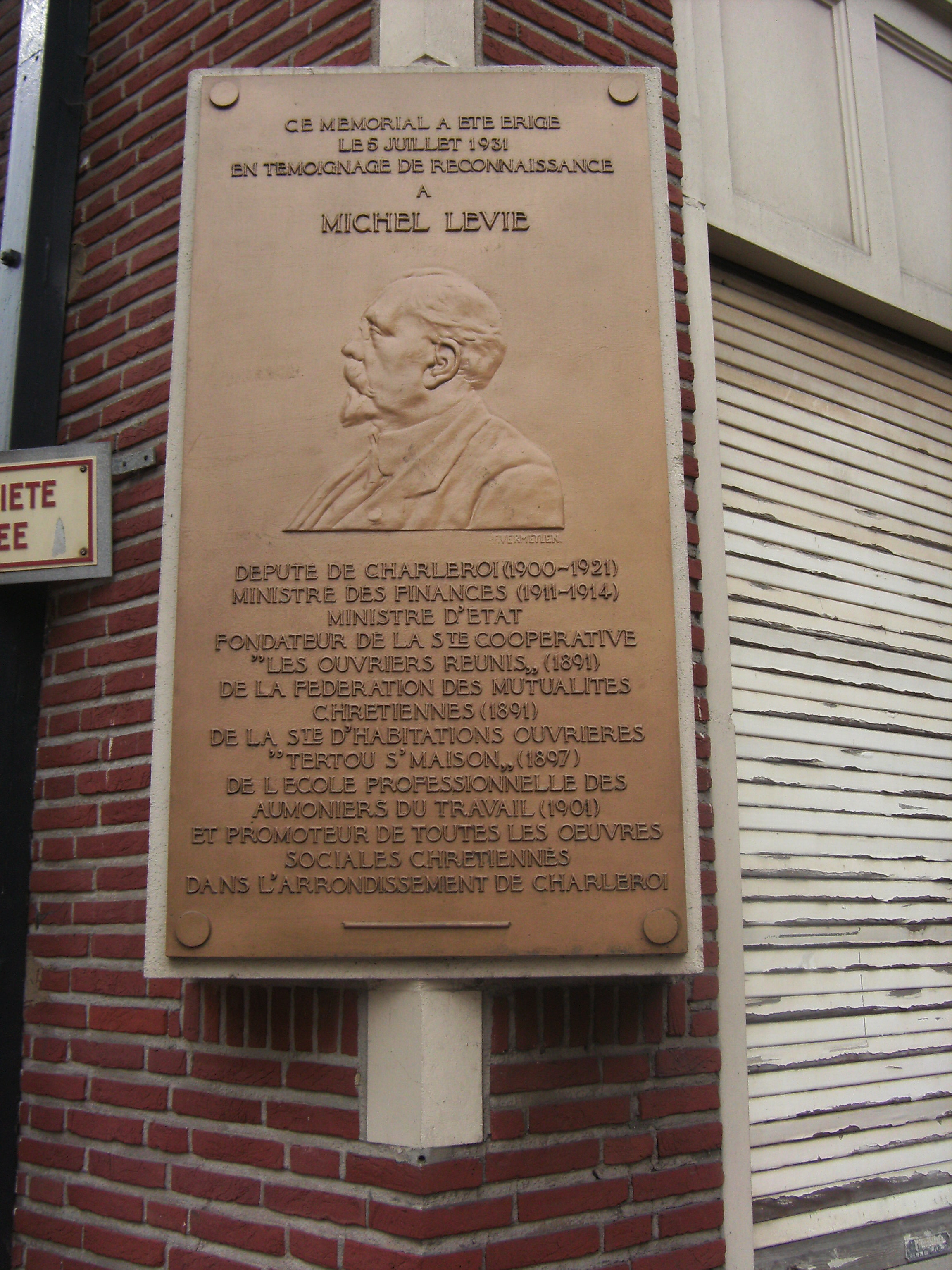 Plaque apposée à Charleroi (Belgique), Grand Rue. Texte : "Ce mémorial a été érigé le 6 juillet 1931 en témoignage de reconnaissance à Michel Levie Député de Charleroi (1900-1921) Ministre des finances (1911-1914) Ministre d'État Fondateur de la Sté coopérative 'Les ouvriers réunis' (1891) de la Fédération des mutualités chrétiennes (1891) de la Sté d'habitations ouvrières 'Tertou s'maison' (1897) de l'école professionnelle des Aumôniers du travail (1901) et promoteur de toutes les œuvres sociales chrétiennes dans l'arrondissement de Charleroi"